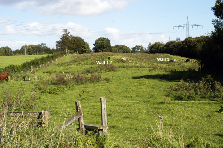 Danewerk: Doppelwall bei Groß Dannewerk